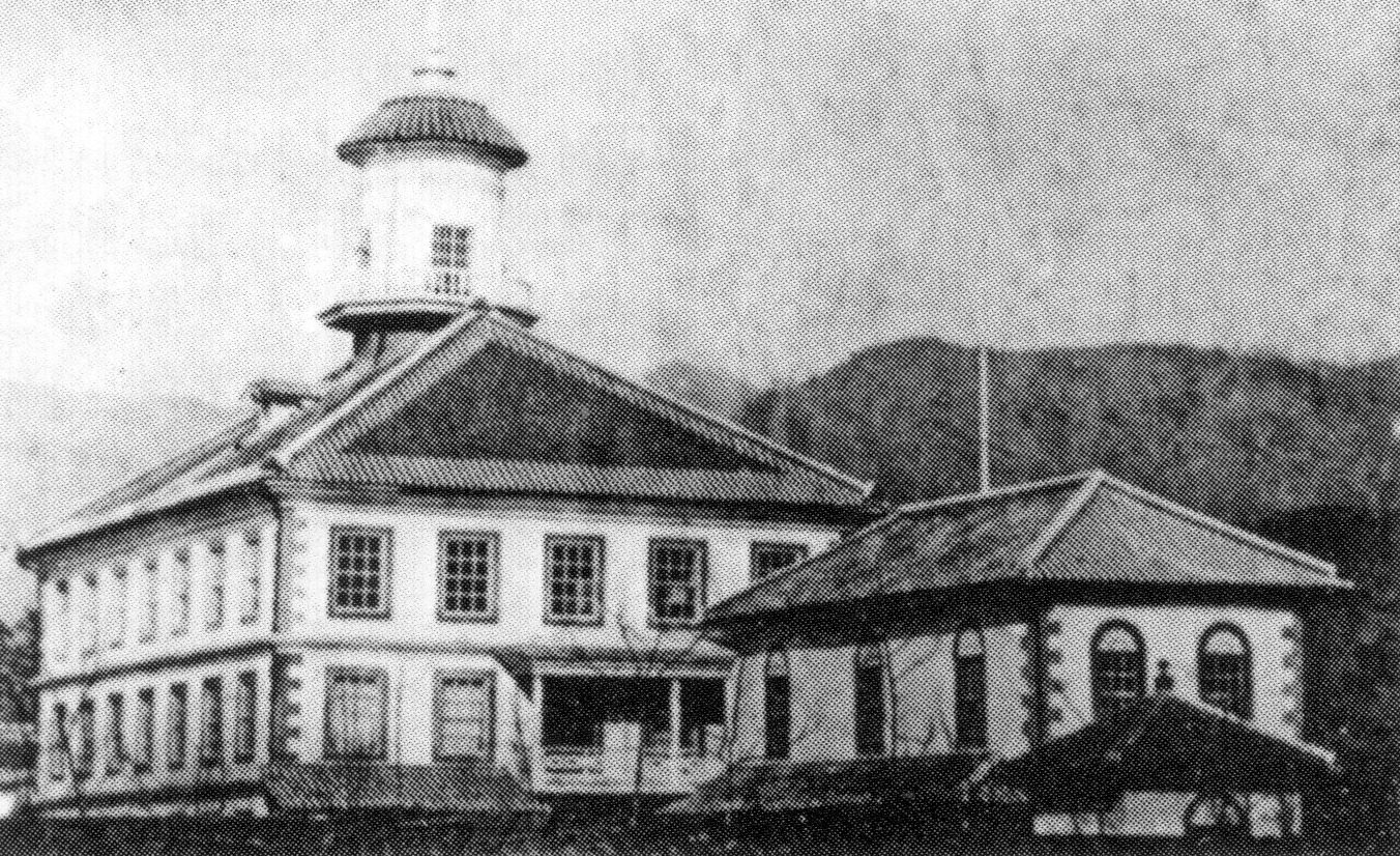 1884年に建てられ1910年まで使用された、山梨県師範学校校舎。